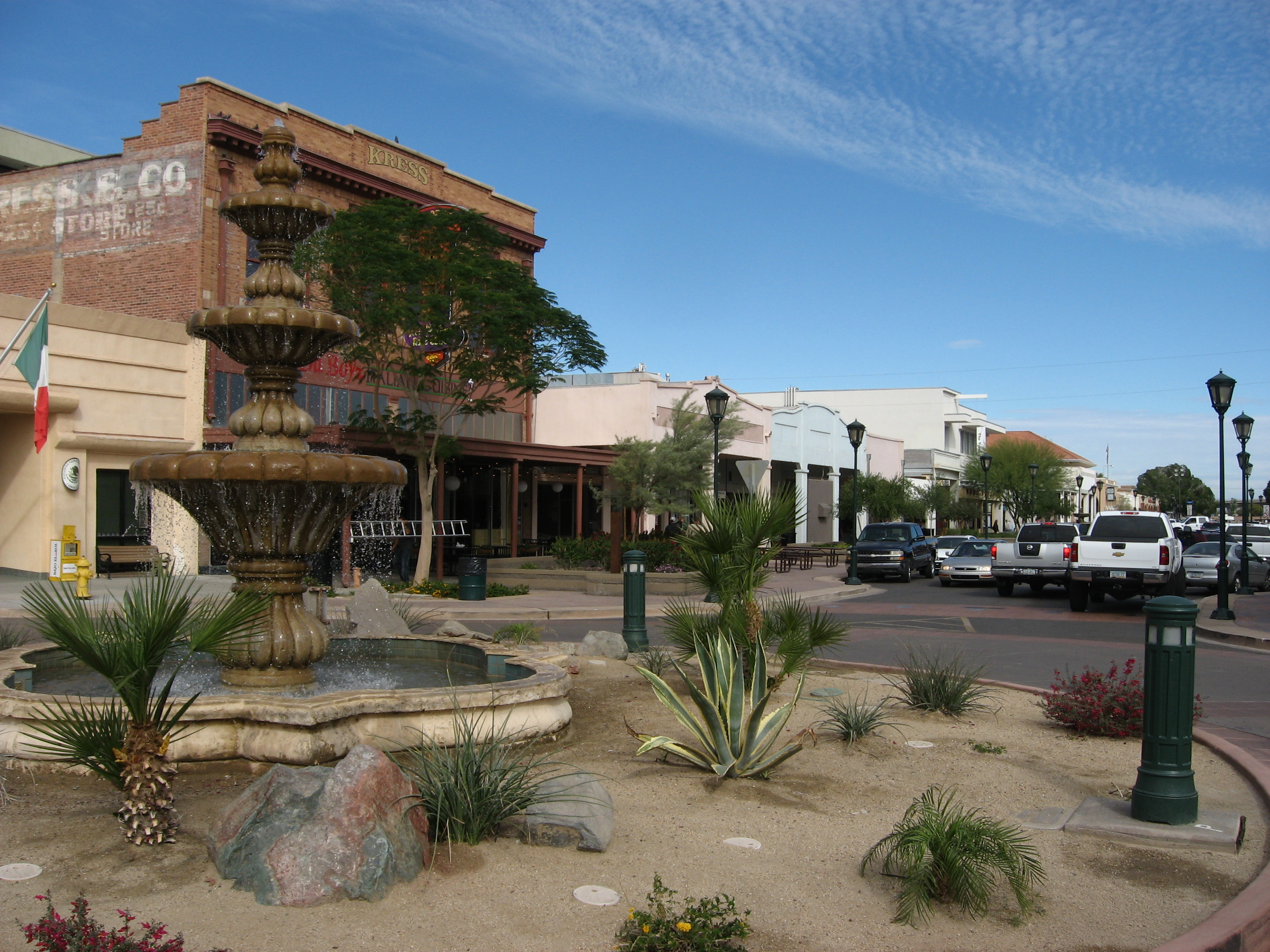 Yuma, Arizona